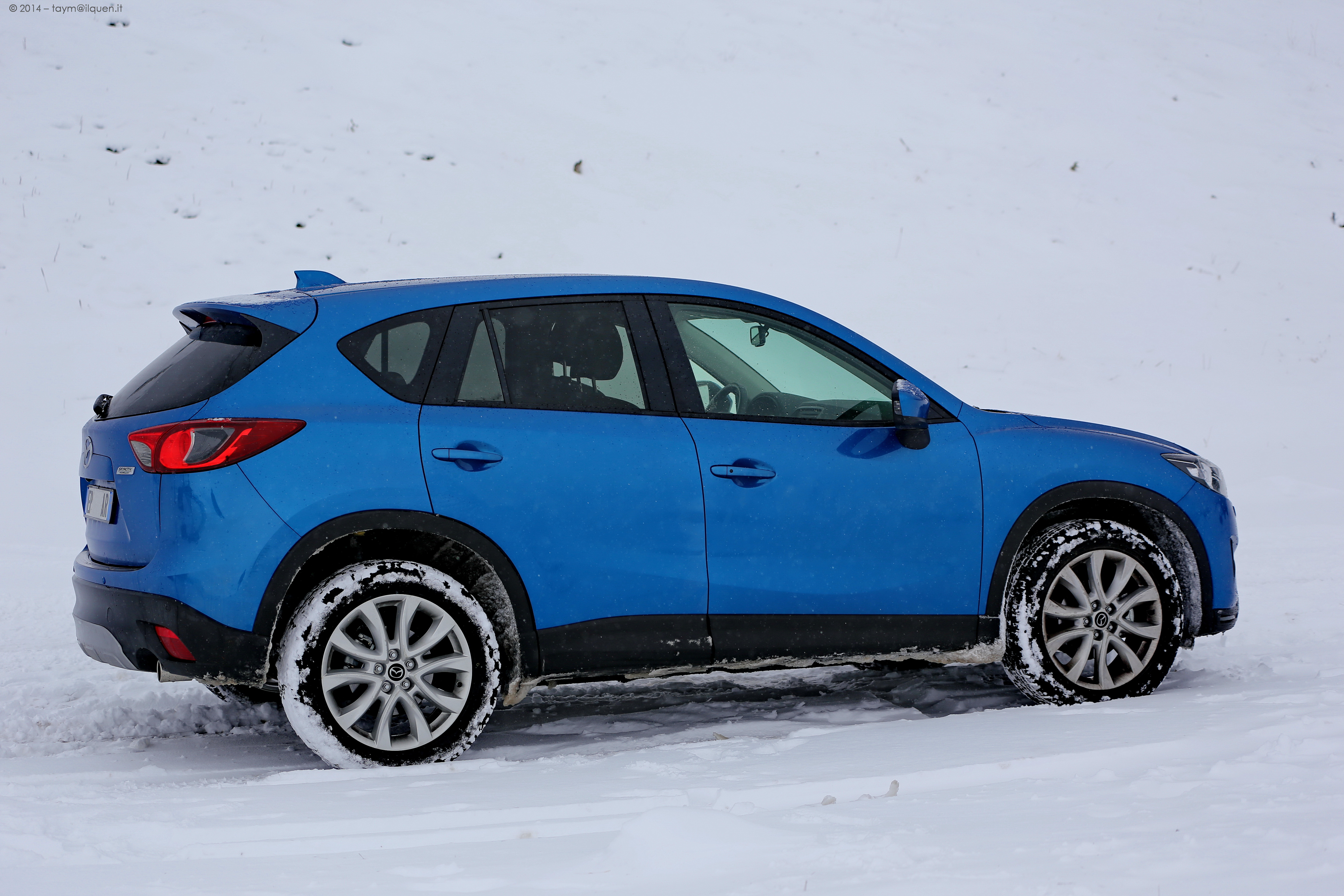 OKIMG_1124